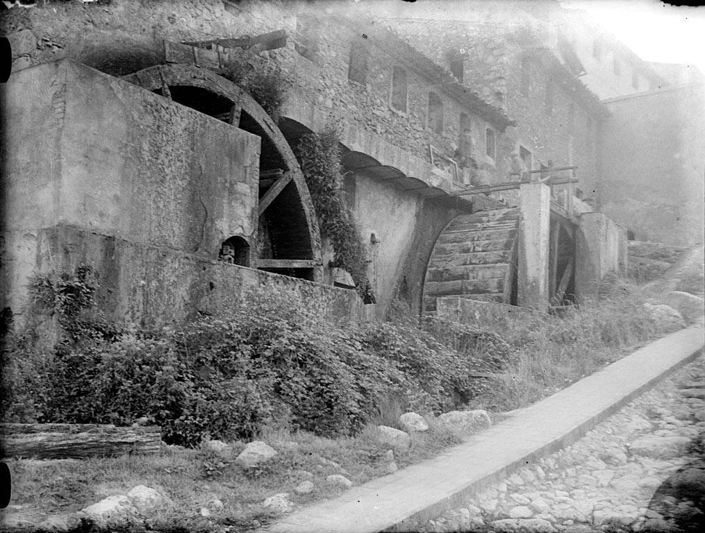 Molí de cal Jaume-el-mas, a la Riba. Enric Ribas i Virgili (Entre 1920 i 1930)